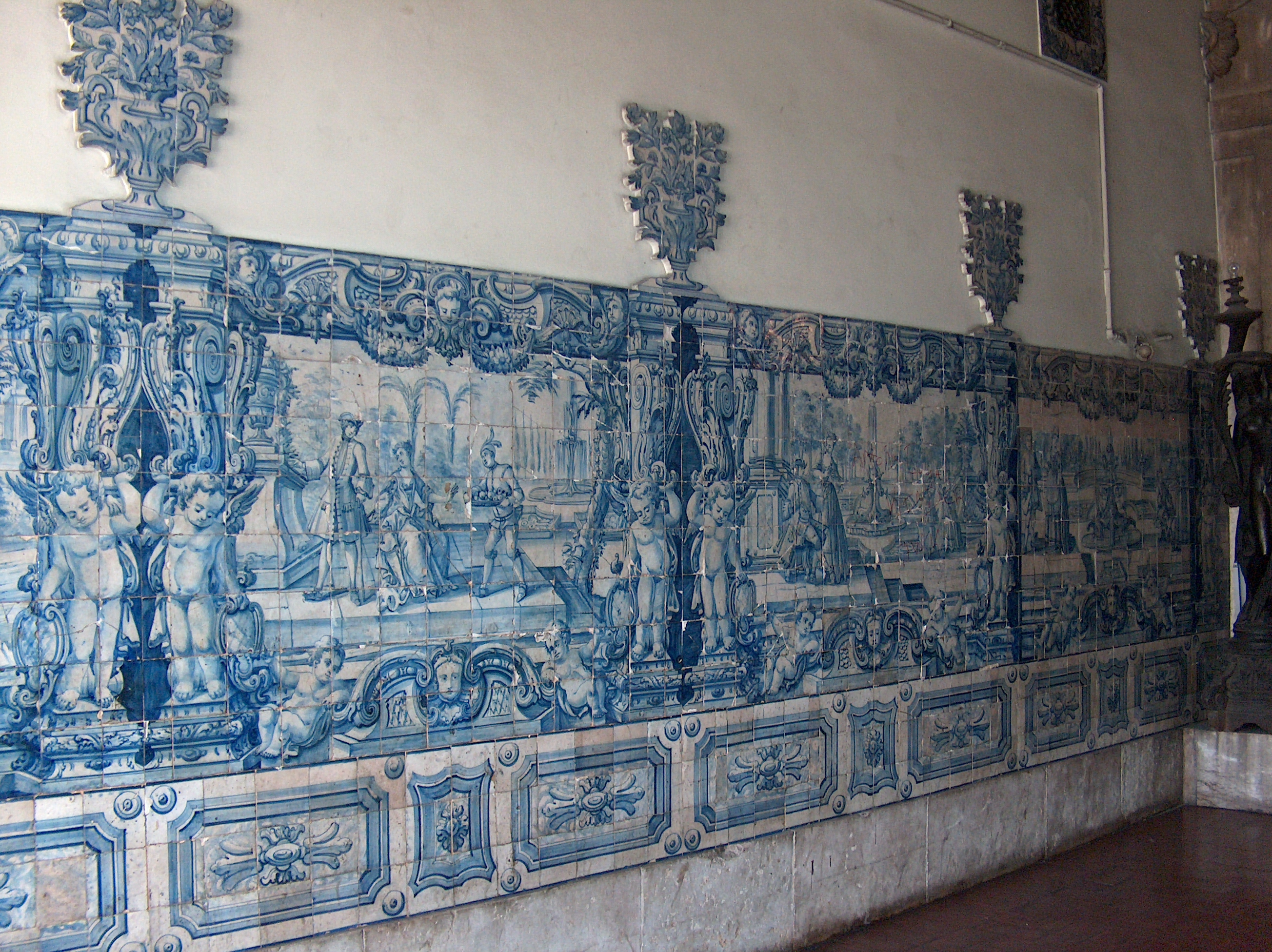 Palácio Valada-Azambuja. Azulejos setecentistas do Palácio Valada-Azambuja, Lisboa, Portugal.